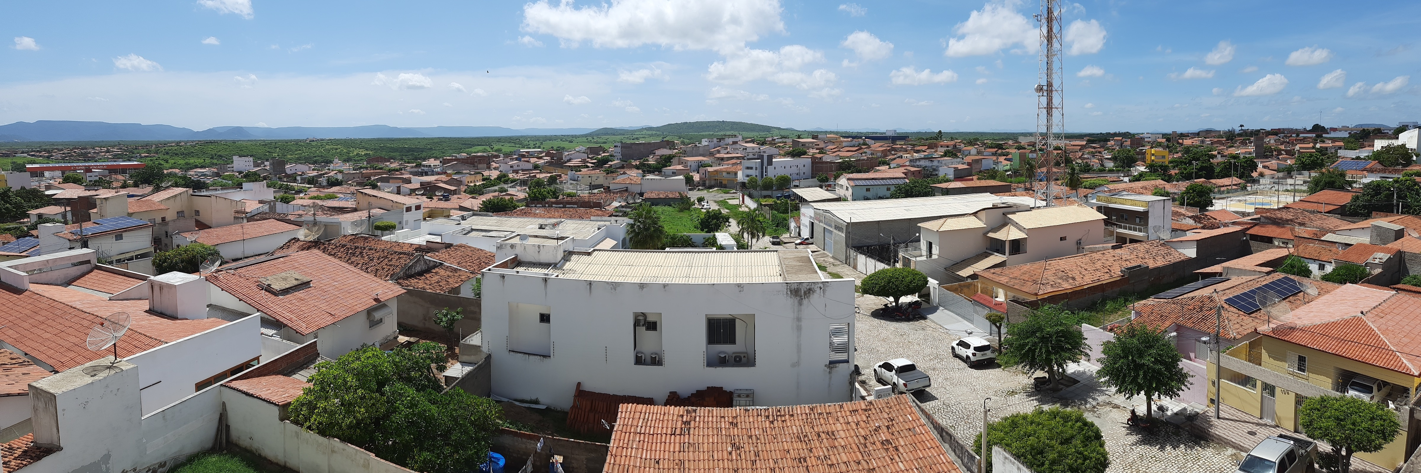 Vista panorâmica do bairro São Benedito em Pau dos Ferros, Rio Grande do Norte, Brasil.